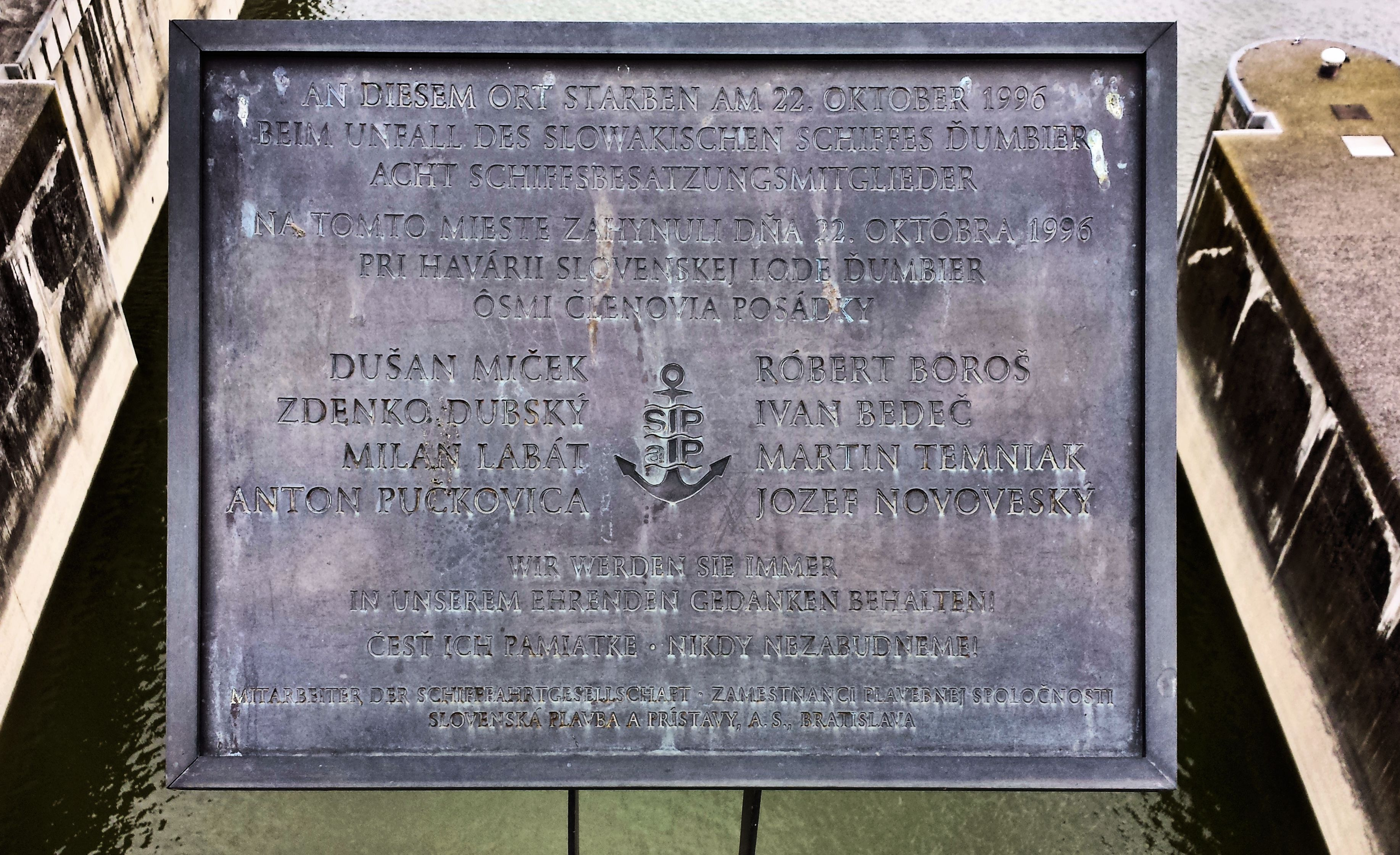 Gedenktafel